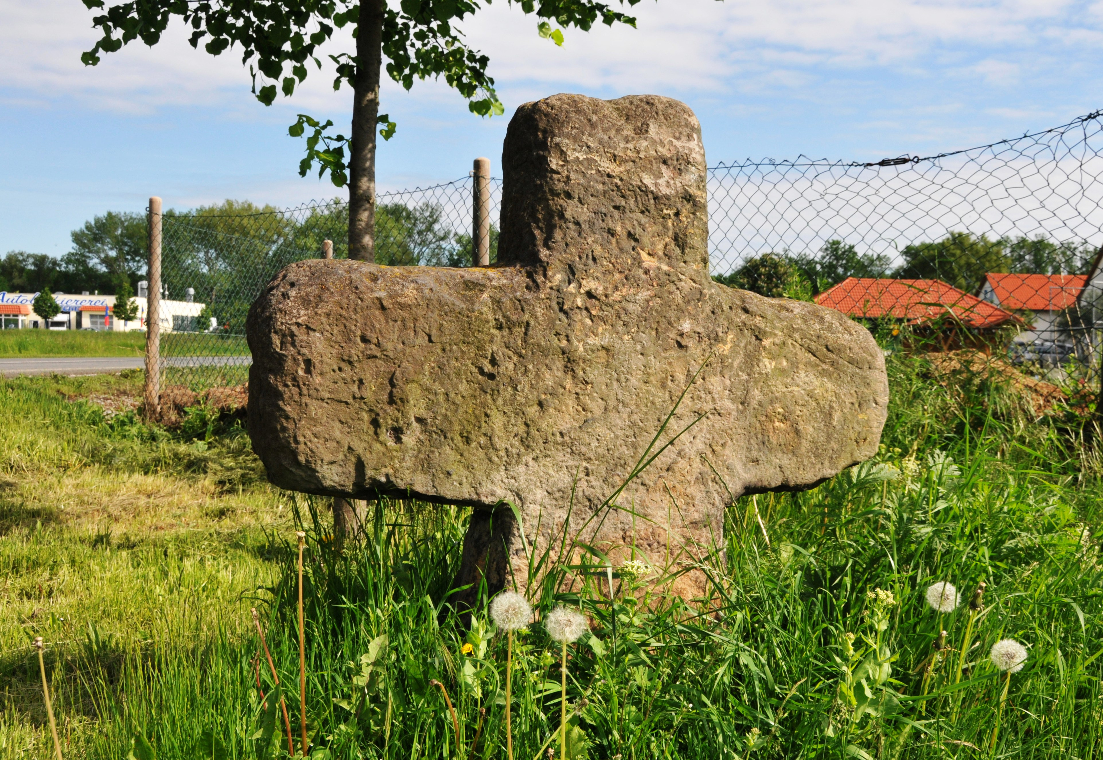 Apfelstädt, Steinkreuz